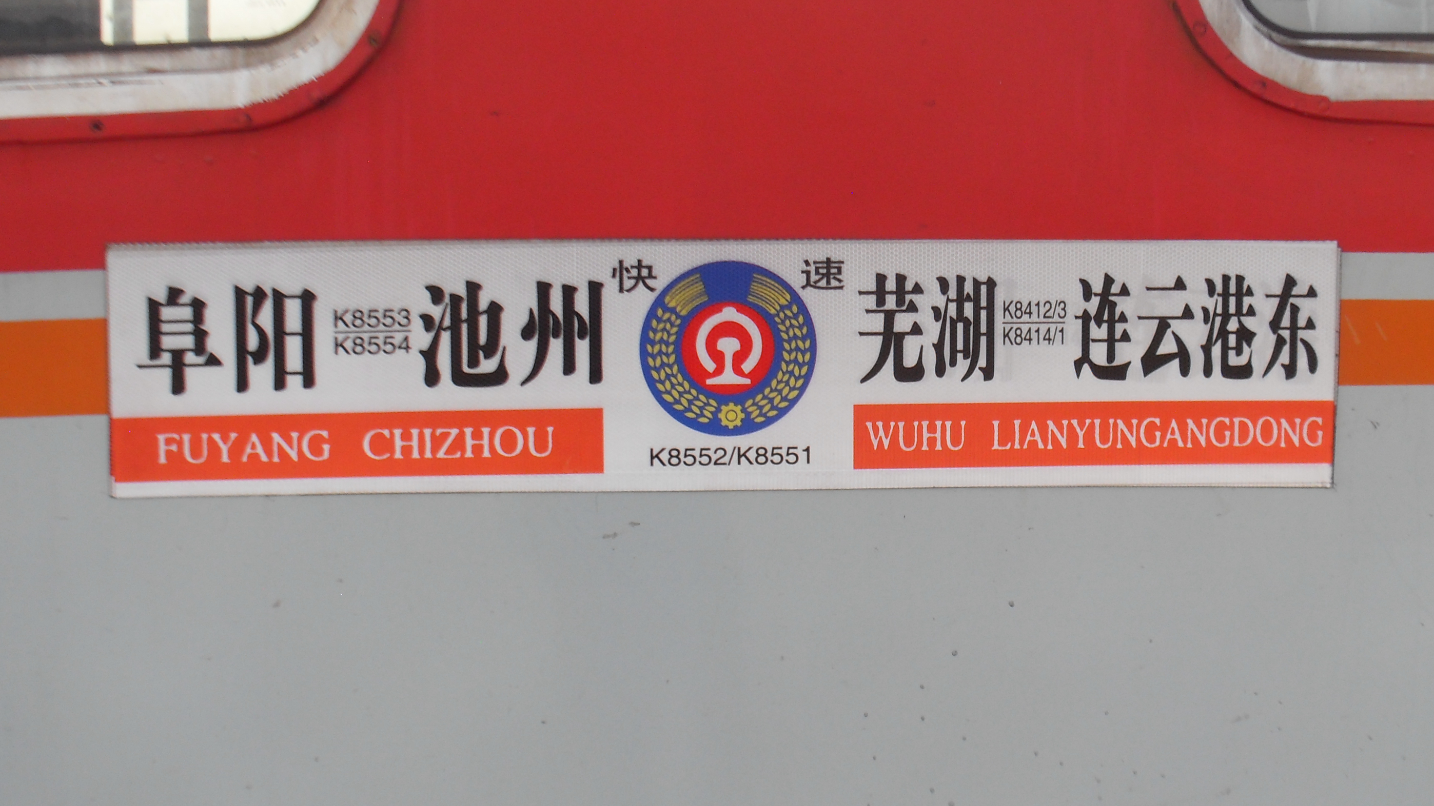 往返阜阳-池州的K8553/4次列车，与往返芜湖-池州的K8551/2次列车，往返连云港东与芜湖的K8411/2次列车套跑。